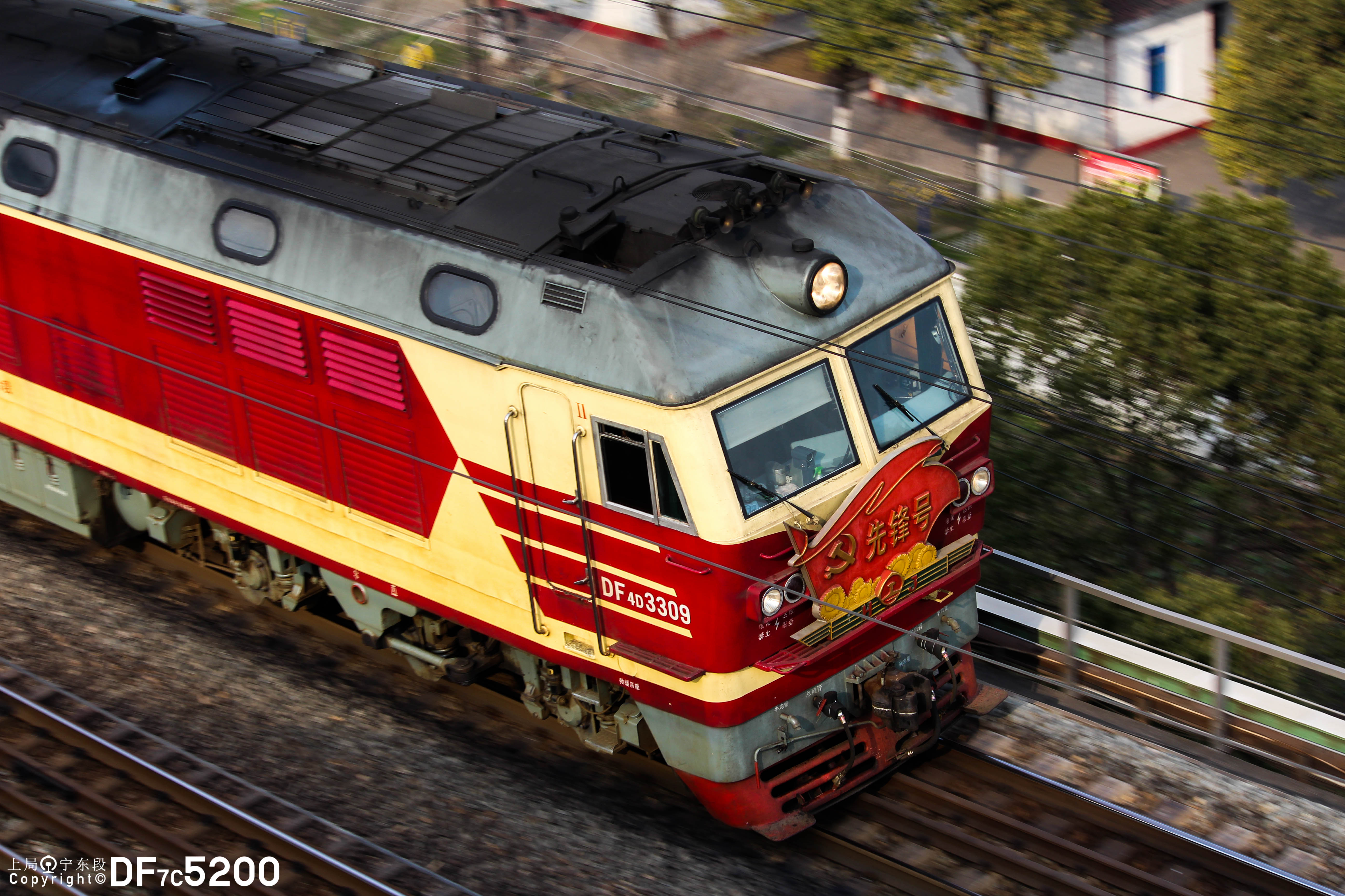 DF4D_3309 Hefei Depot